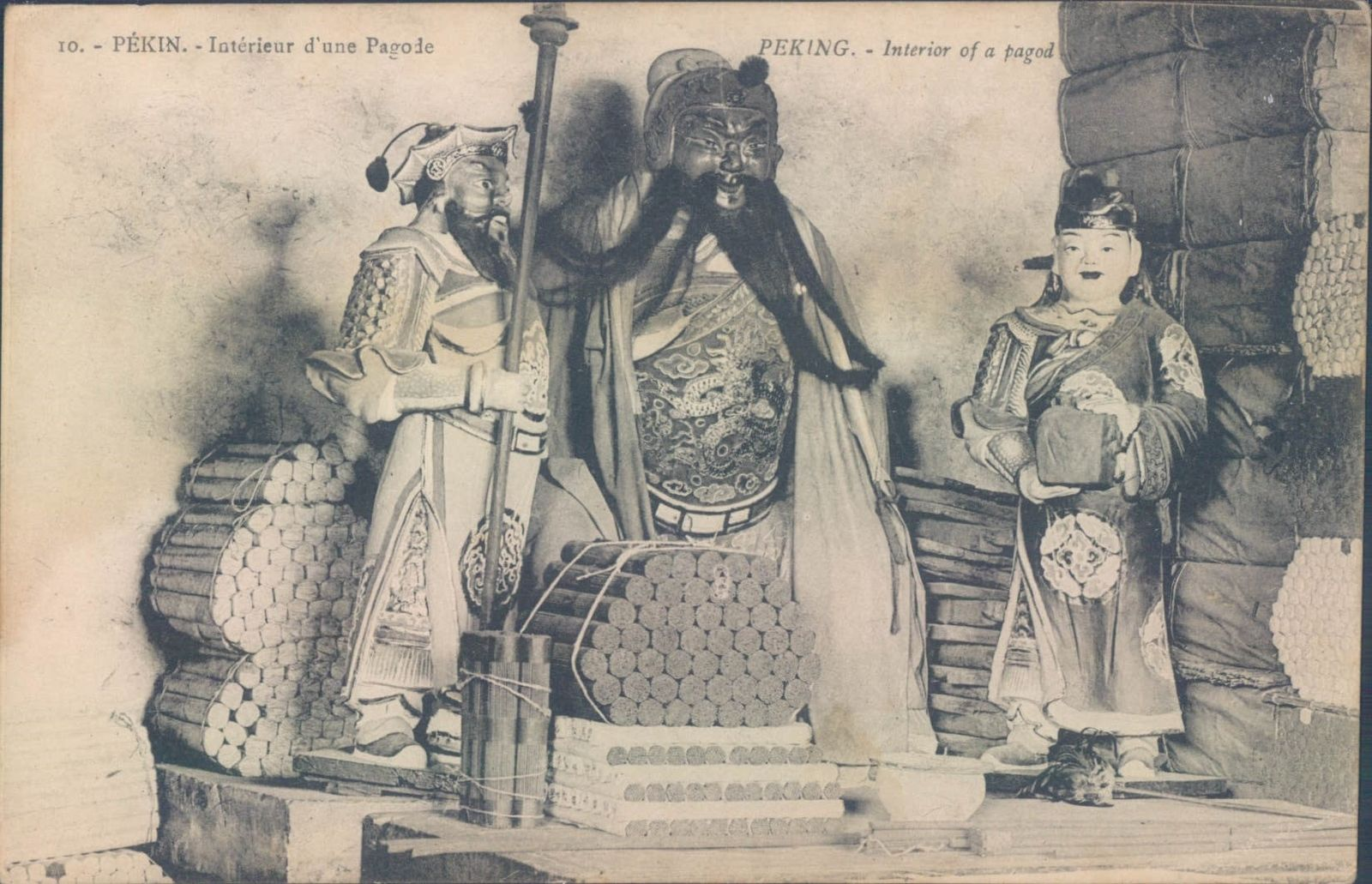 Interieur d'une Pagode, Pekin